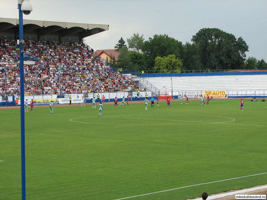 Stadionul Municipal de Sibiu durante un Vointa Sibiu - Steaua